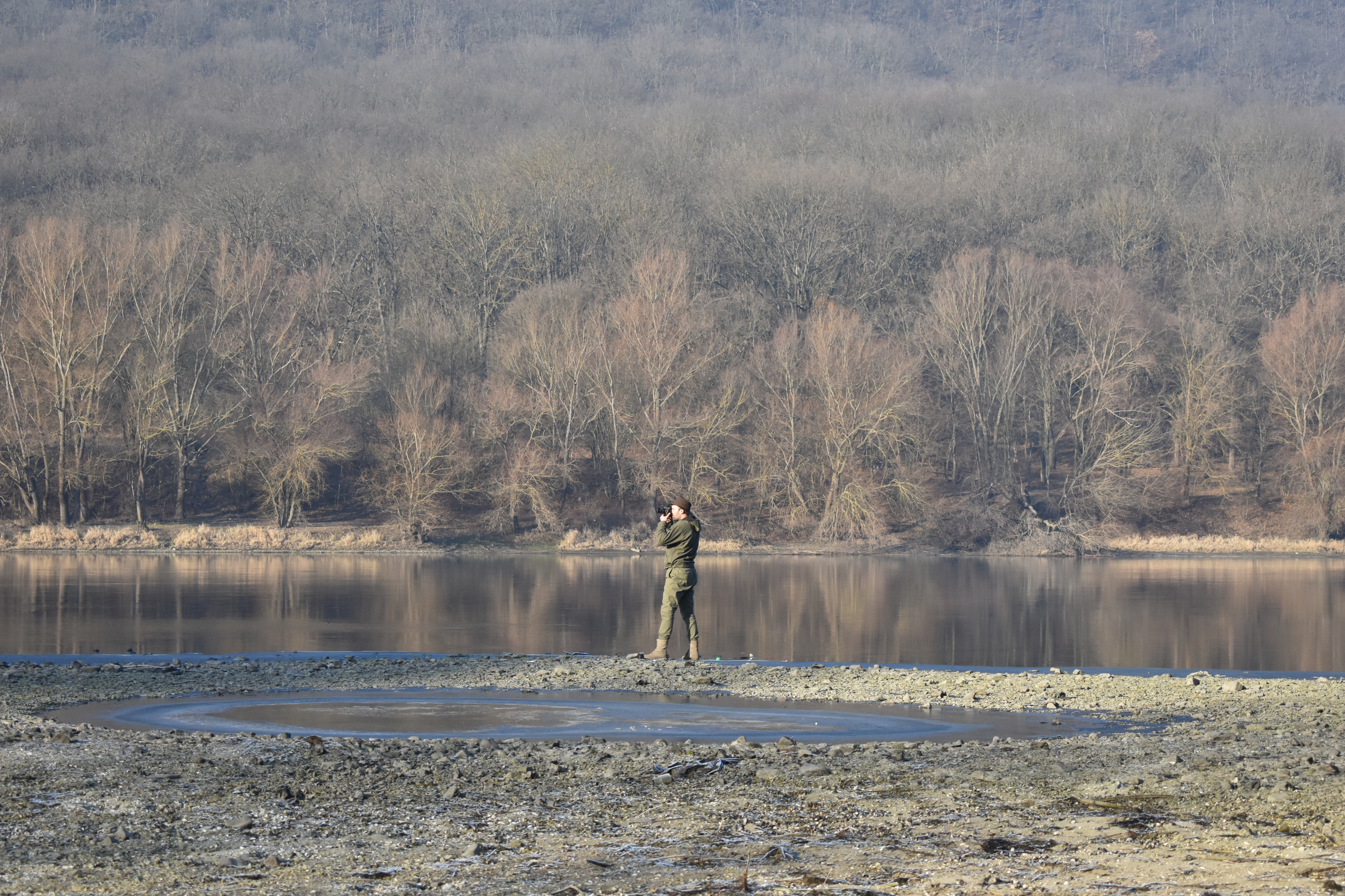 Регіональний ландшафтний парк "Дністер" в районі с. Садківці Могилів-Подільського району Вінницької області